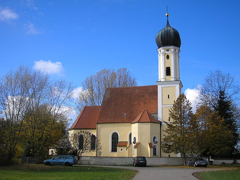 Wallfahrtskirche Maria Kappel (Schmiechen, Landkreis-Aichach-Friedberg, Bayerisch-Schwaben). Gesamtansicht. Eigene Aufnahme, Nov. 2006 / Pilgrimage church Maria Kappel near Schmiechen, Bavaria, Germany). Total view. Own photo, Nov. 2006